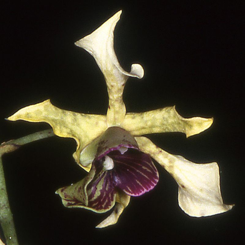 Dendrobium atroviolaceum